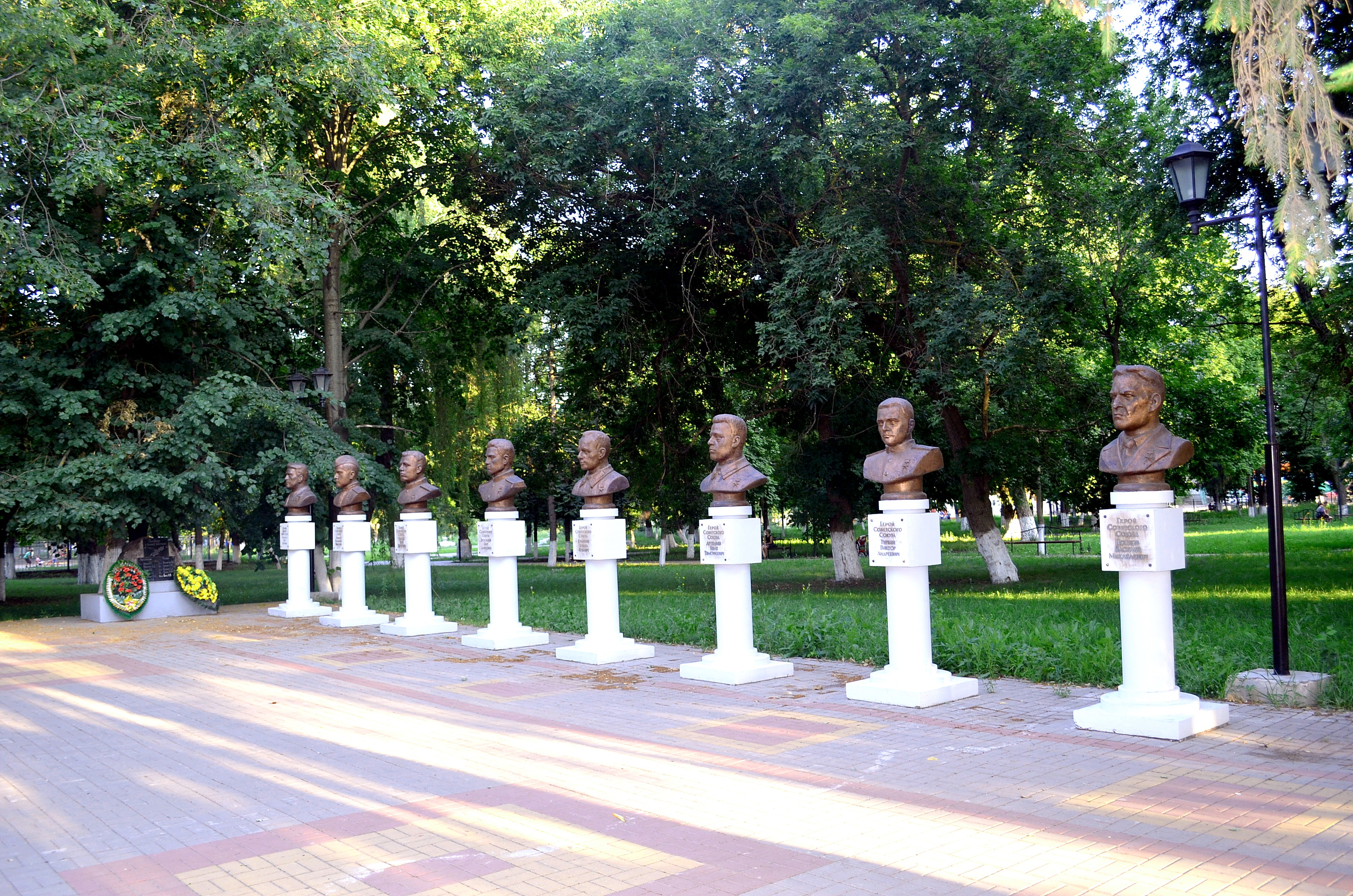 Бобров. Аллея Героев (правая сторона) в парке